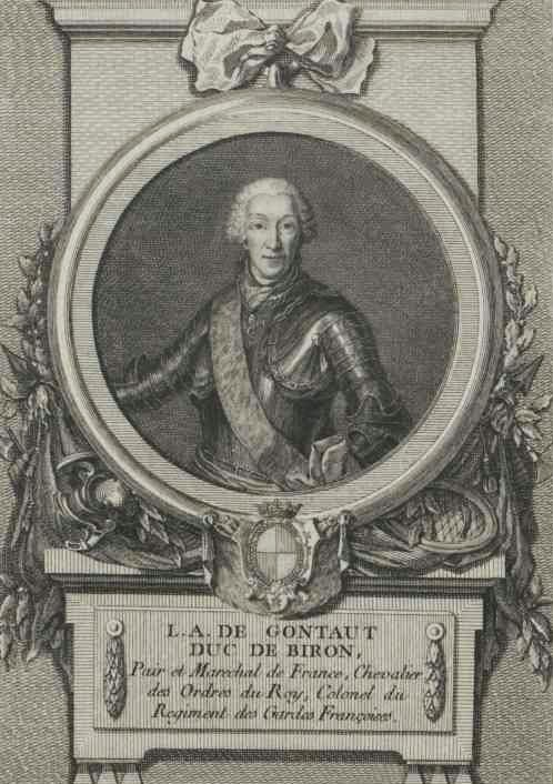 Marschall von Frankreich Louis Antoine de Gontaut, Duke of Biron (1701-1788)